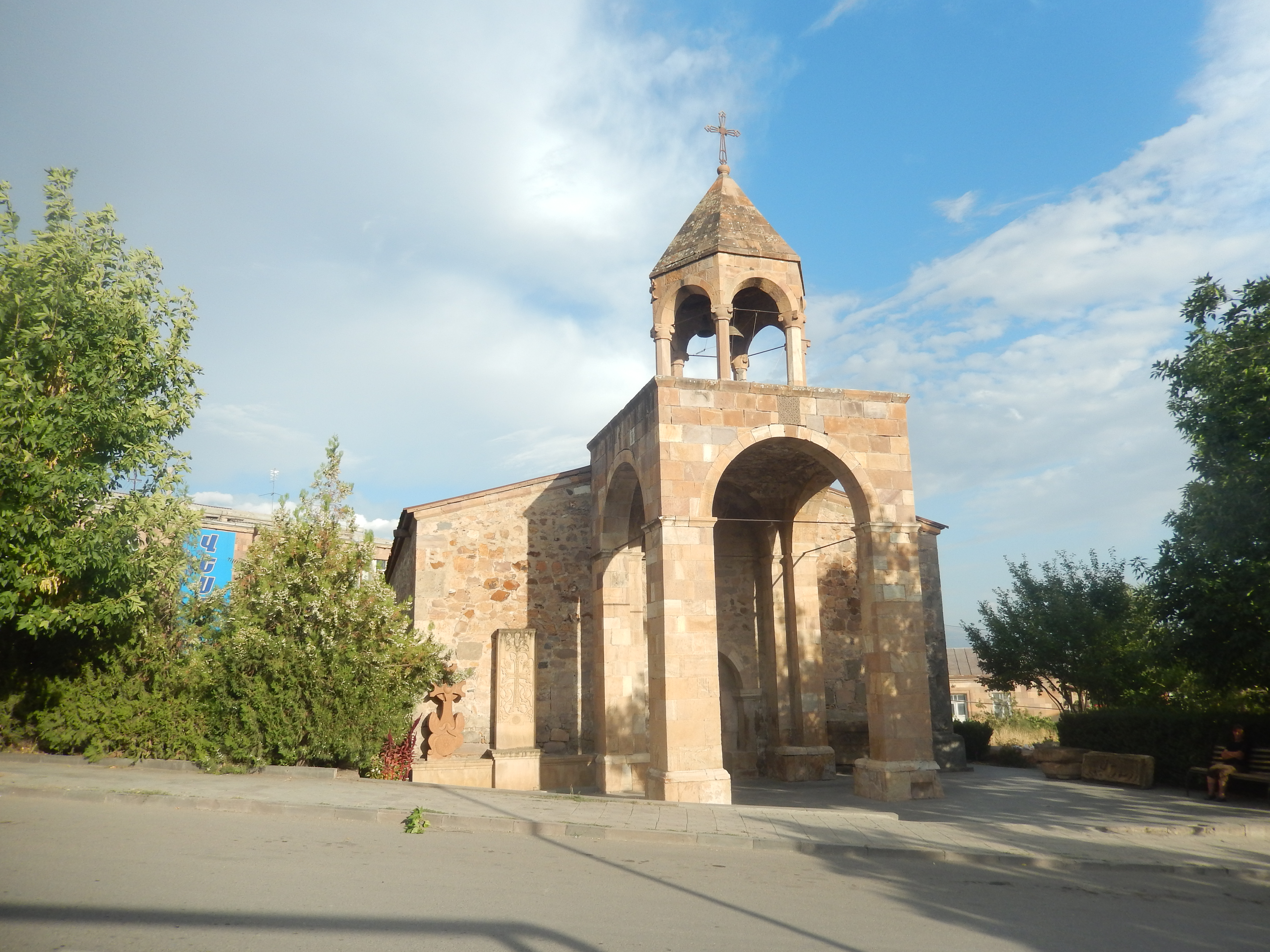 Սուրբ Սարգիս, Եղեգնաձոր 1/2.1